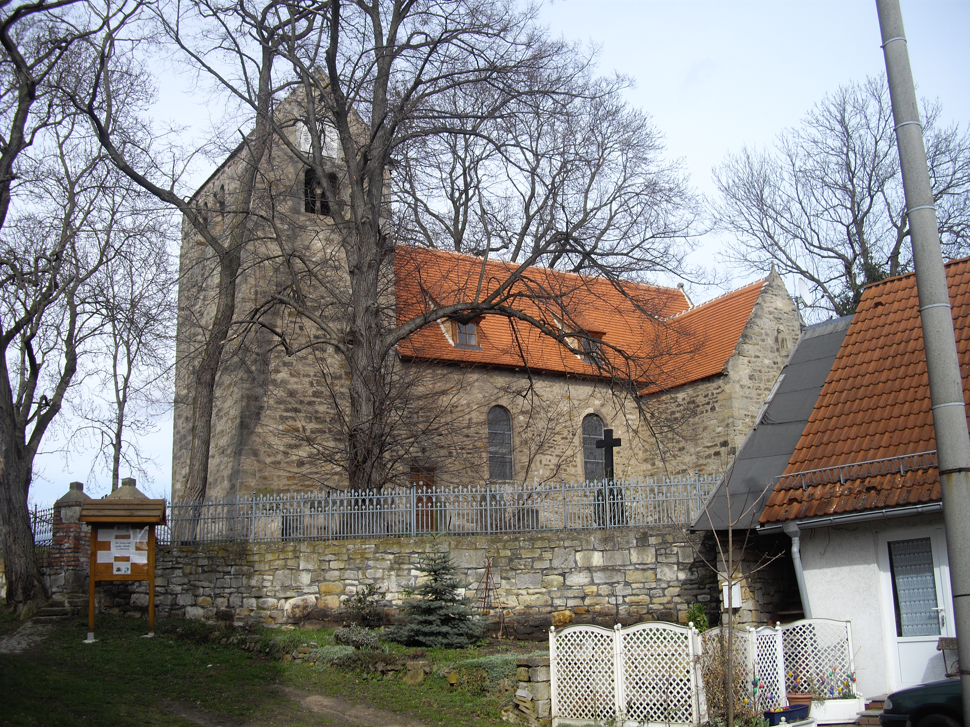 Die Dorfkirche von Rottelsdorf, Gerbstedt